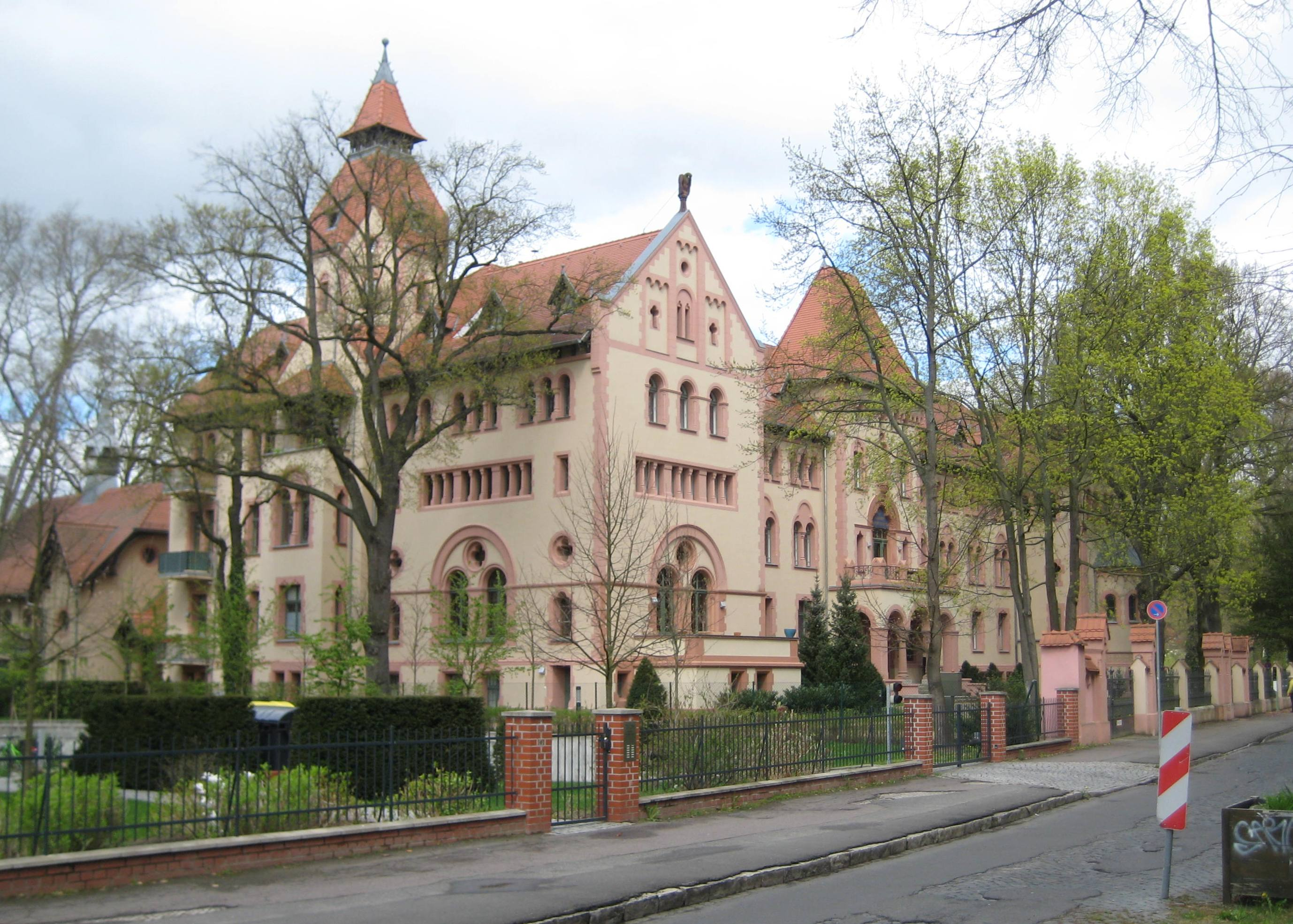 Denkmalgeschütztes Kaiserin-Augusta-Stift Am Neuen Garten 29-32 in Potsdam. Bis 1994 Westeuropazentrale des sowjetischen Geheimdienst GRU.